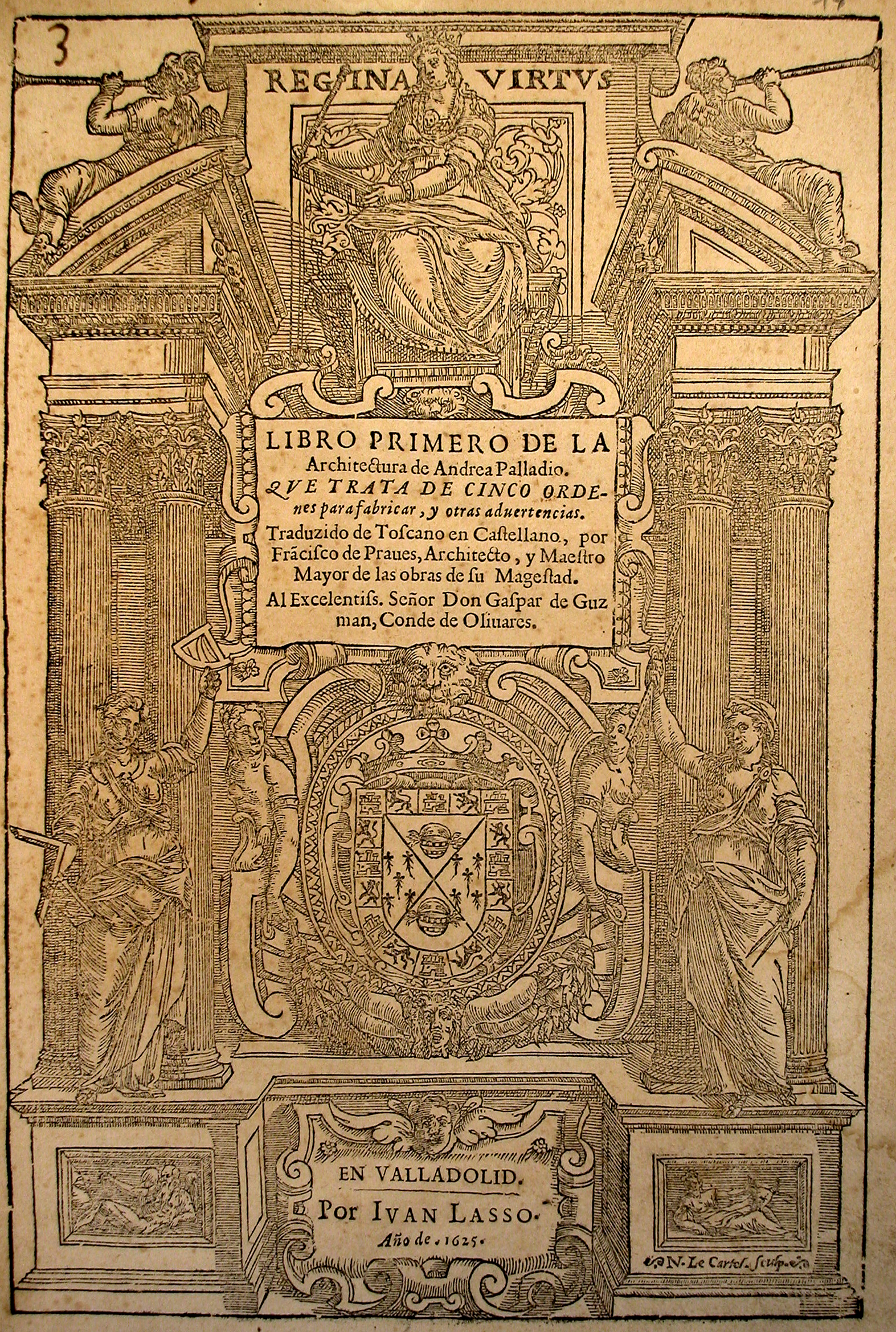 Andrea Palladio: Libro primero de la Arquitectura... traducido... por Francisco de Praves, Valladolid, Juan Lasso, 1625.